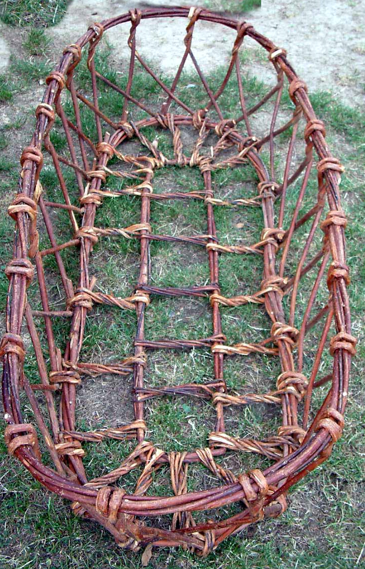 Cestone di vimini che veniva usato per portare nella stalla il fieno o l'erba per il bestiame. In italiano viene chiamato : crina per il fieno